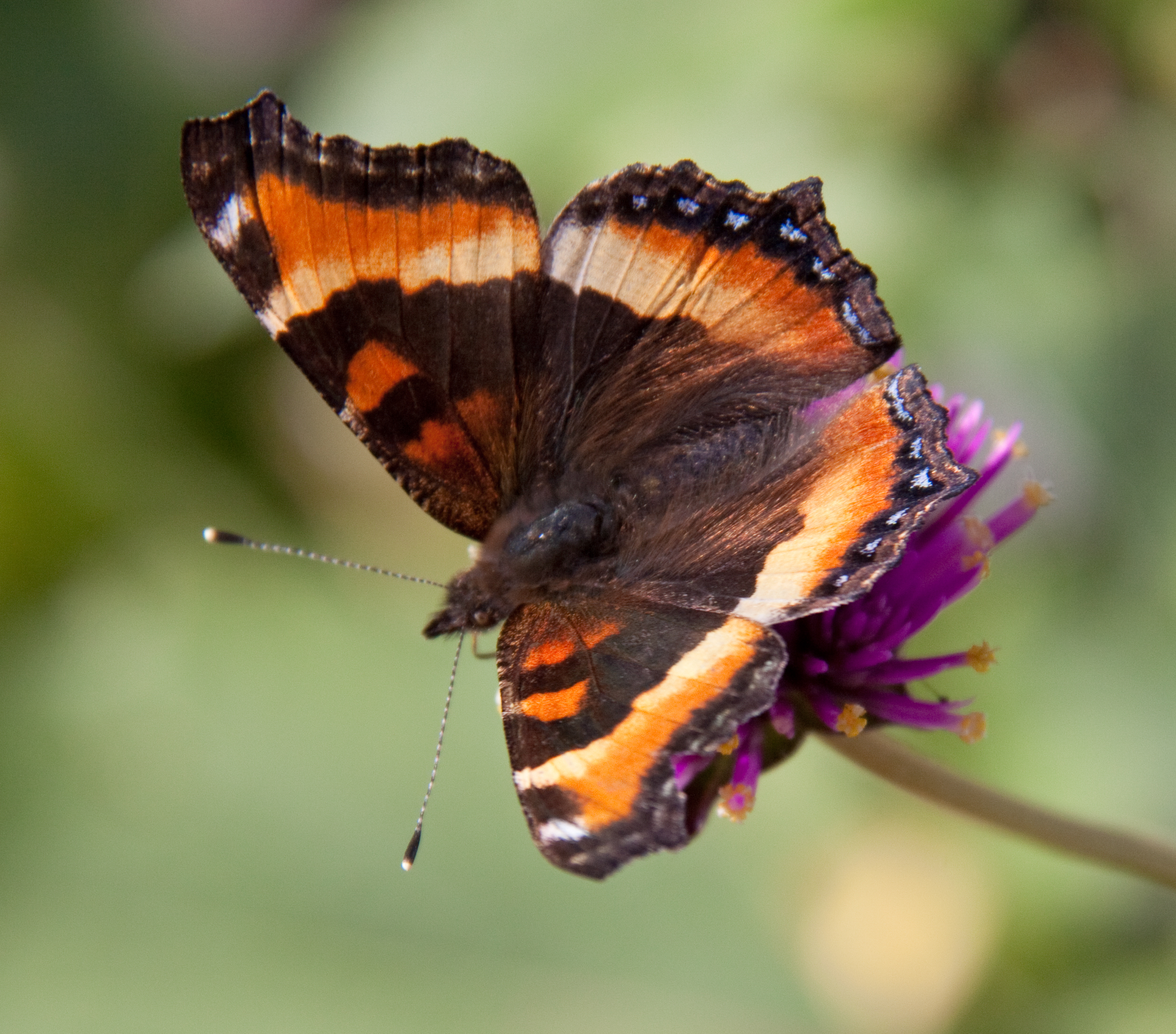 Milberts Tortoiseshell - Aglais milberti 2